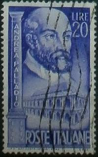 Andrea Palladio - 1949 - francobolli Italia